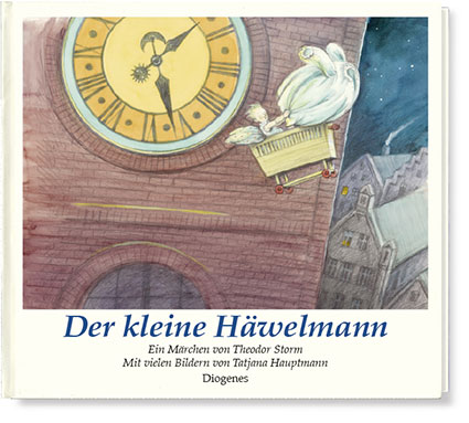 Der kleine Häkelmann mit Illustrationen von Tatjana Hauptmann